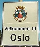 Ortsschild von Oslo